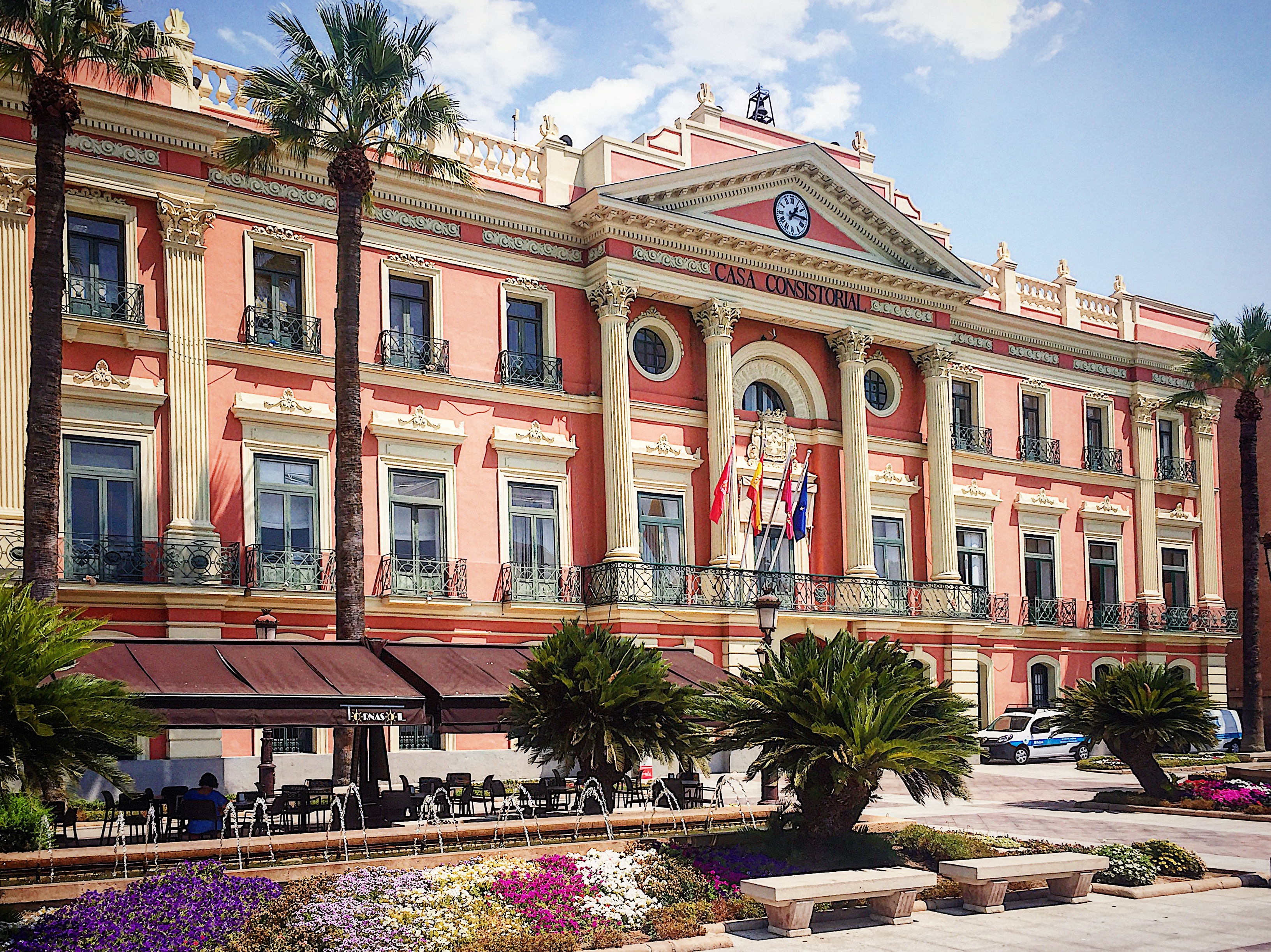 Ayuntamiento de la ciudad de Murcia España.